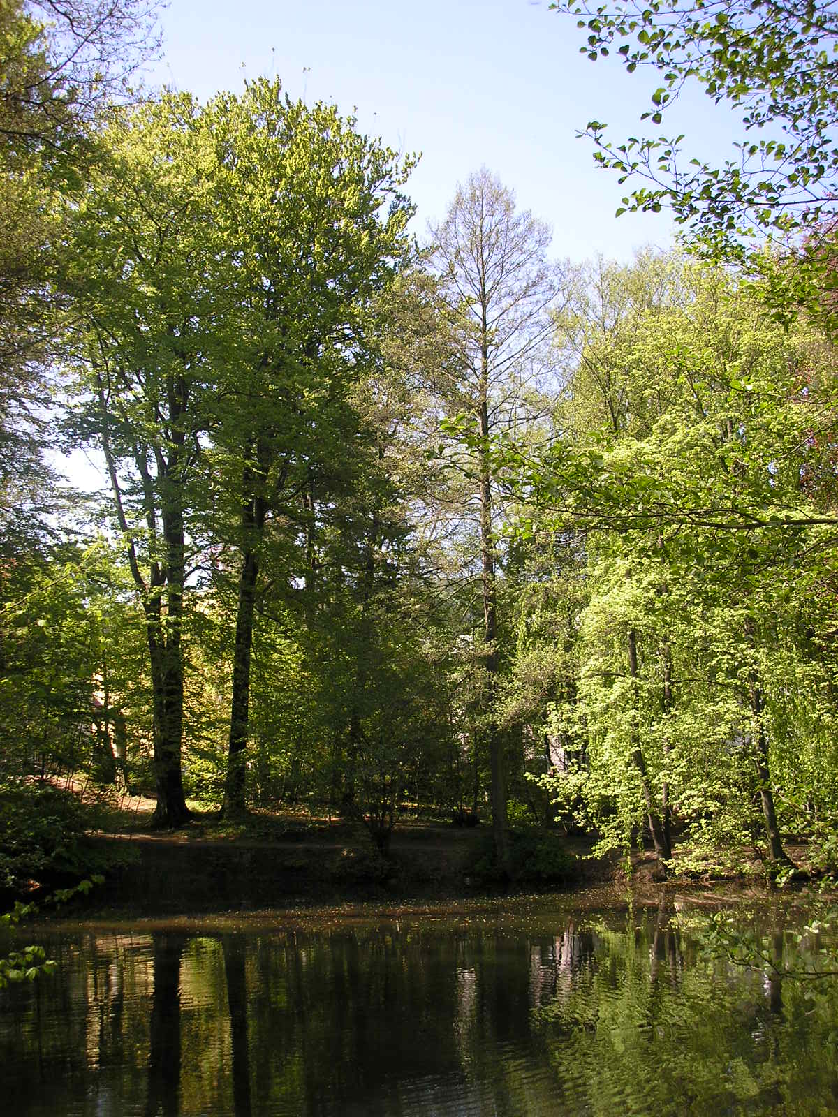 Teich im alten Kurpark in Ilmenau (Thüringen).